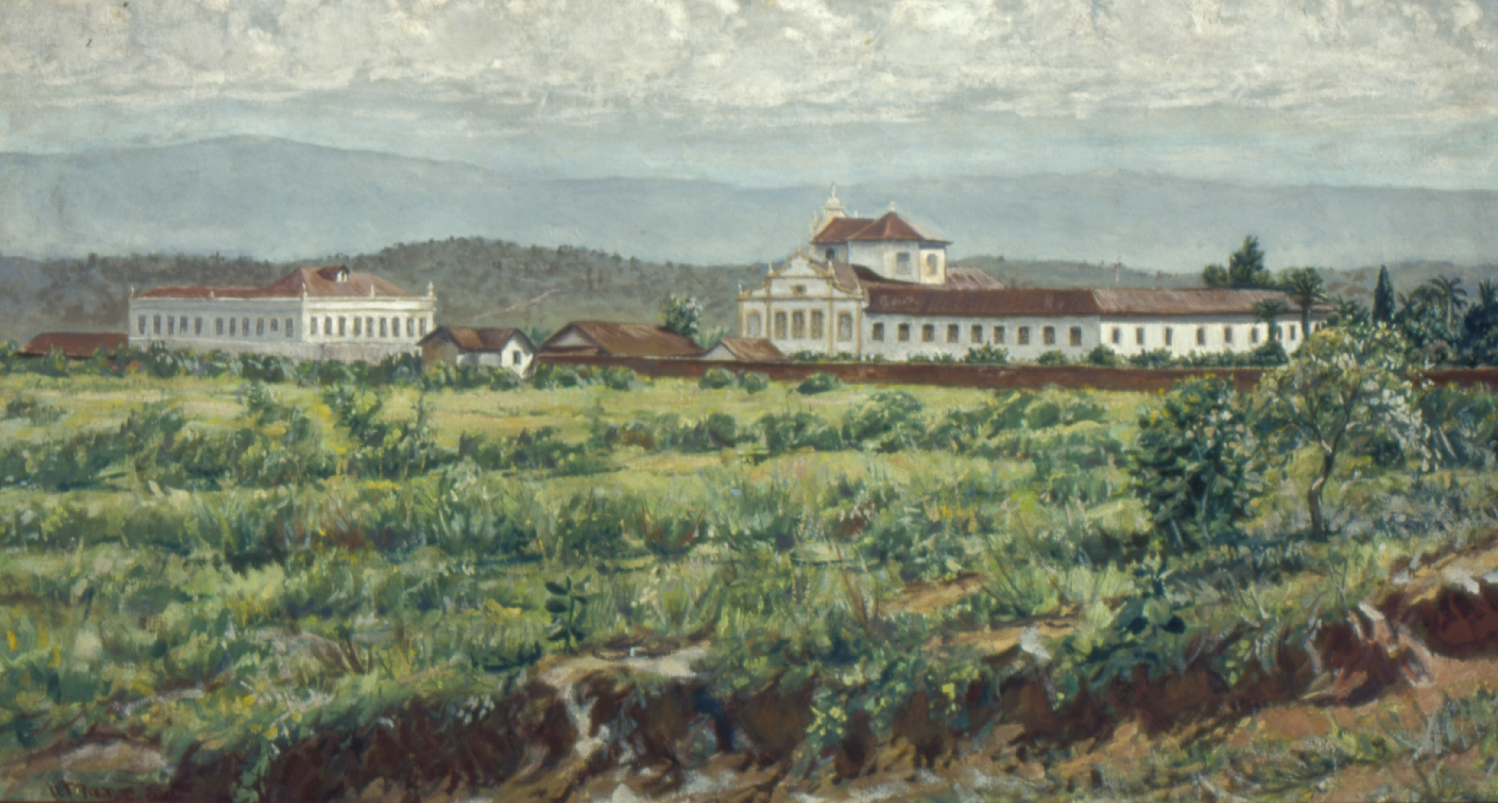 Obra que integra o acervo do Museu Paulista da USP. Coleção Fundo Museu Paulista - FMP